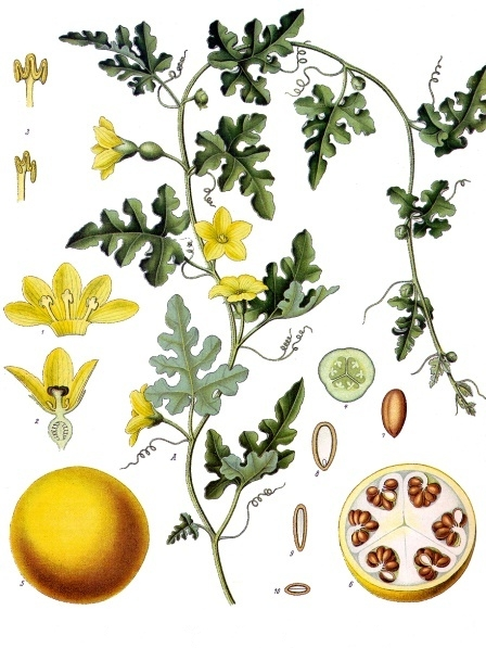 Koloquinte. A blühender Zweig, natürl. Grösse; 1 männliche Blüthenkrone mit Staubgefässen, aufgeschnitten, vergrössert; 2 weibliche Blüthe im Längsschnitt, desgl.; 3 Staubgefässe, ein seitliches und das mittlere, desgl.; 4 Fruchtknoten im Querschnitt, desgl.; 5 reife Frucht, natürl. Grösse; 6 dieselbe im Querschnitt, desgl.; 7 Same, vergrössert; 8 und 9 derselbe im Längsschnitt von verschiedenen Seiten, desgl.; 10 derselbe im Querschnit, desgl.